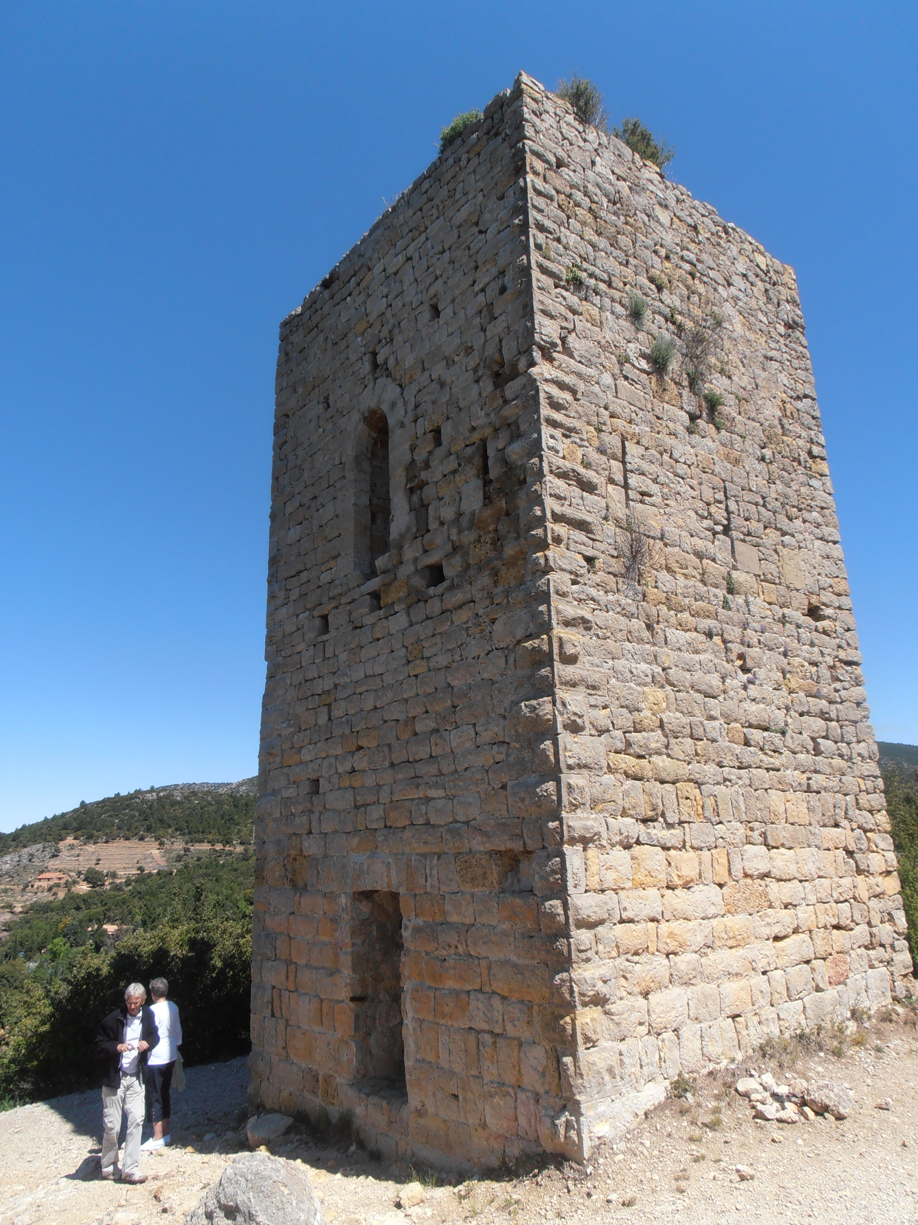 Var, Tourtour, Tour La Tour Grimaldi, ou Grimaud. Elle est construite en 1129 et célèbre le souvenir de la victoire de la bataille de Tourtour et de Gibelin de Grimaldi qui reçut de Guillaume Ier de Provence la baronnie de Grimaud en récompense de ses exploits contre les Sarrasins vers l’an 975.